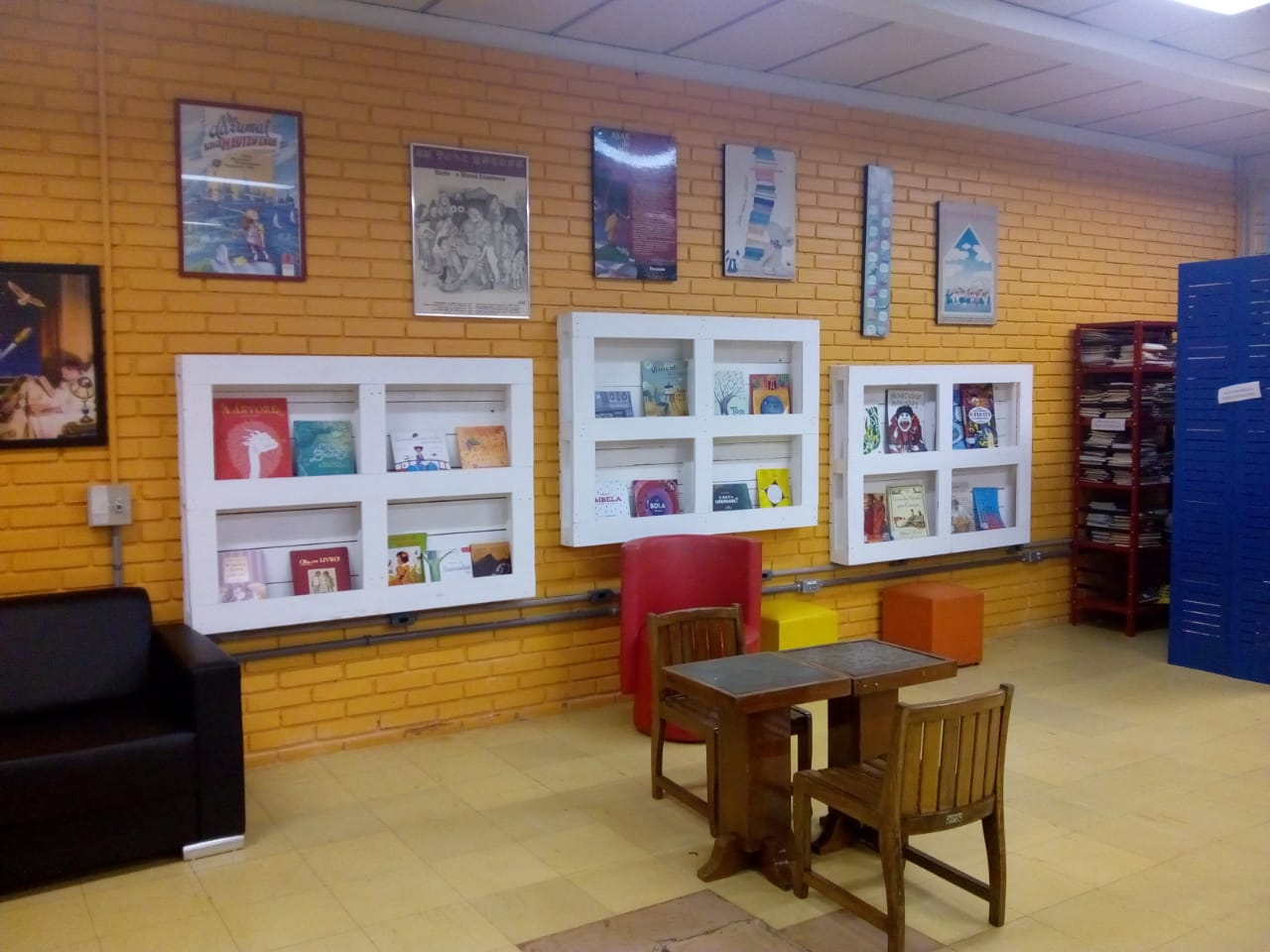 Na imagem visão interna da biblioteca modelo do laboratório. Ambiente decorado com quadros e prateleiras com livros infantis, mobiliário adequado para crianças.